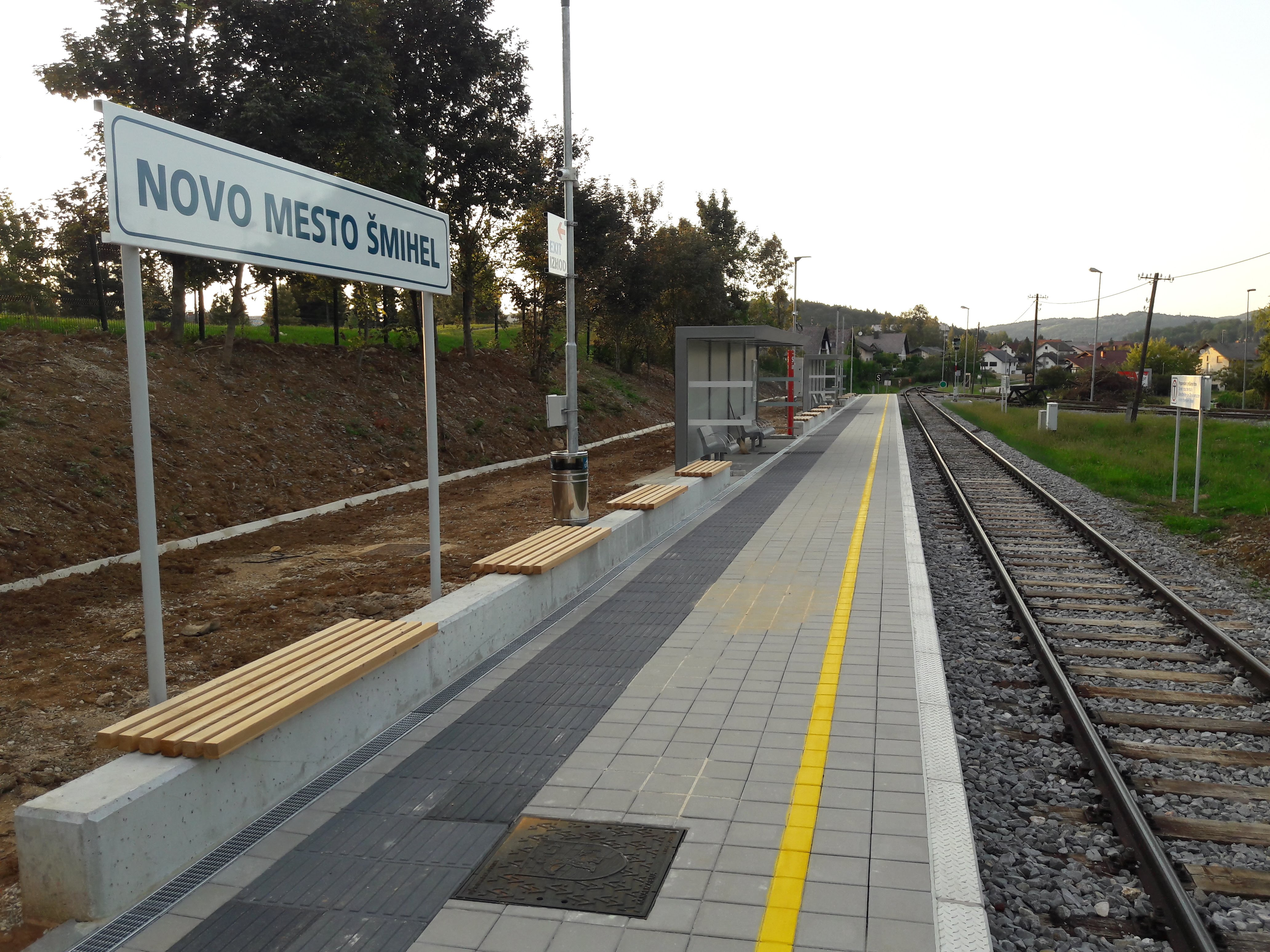 Postajališče Novo mesto Šmihel, Slovenija